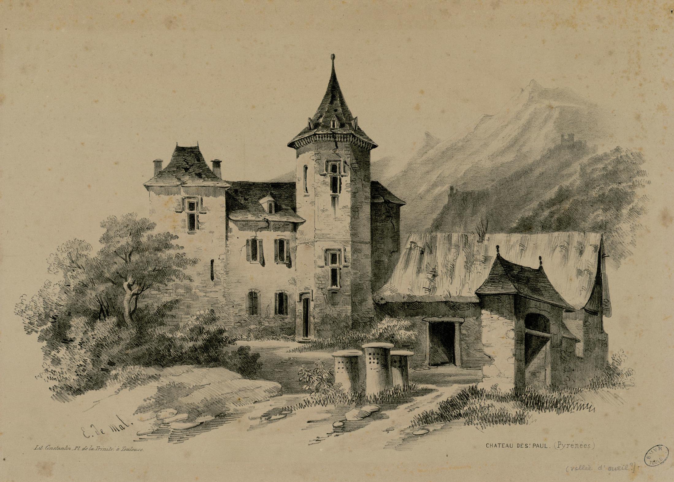 Fait partie d'un recueil de 23 planches lithographiées en camaïeu Ancely, René (1876 - 1966). Possesseur